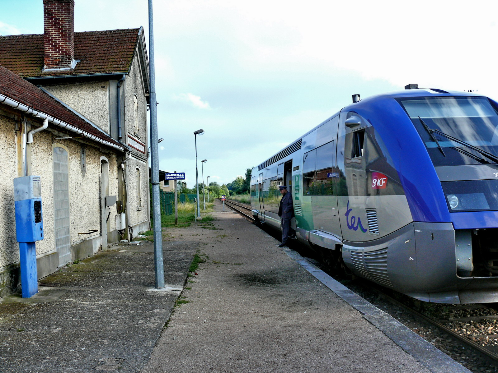 Marseille-en-Beauvaisis : Train vers Beauvais assuré par un couplage des autorails X 73609 et X 73723 de la région Picardie